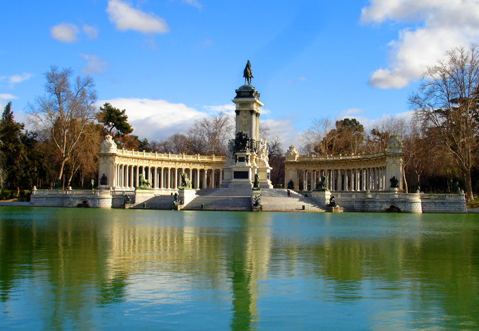 Laghetto e il monumento ad Alfonso XII di Spagna nel Parco del Buon Ritiro